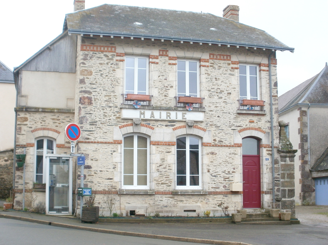 Photo de la mairie de Saint-Georges-le-Gaultier, commune de la Sarthe.